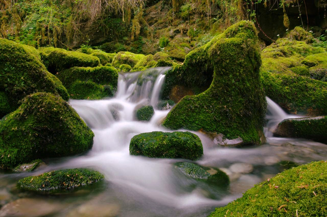 La rivière Arros, dans sa partie amont, encaissé dans un vallon très humide.